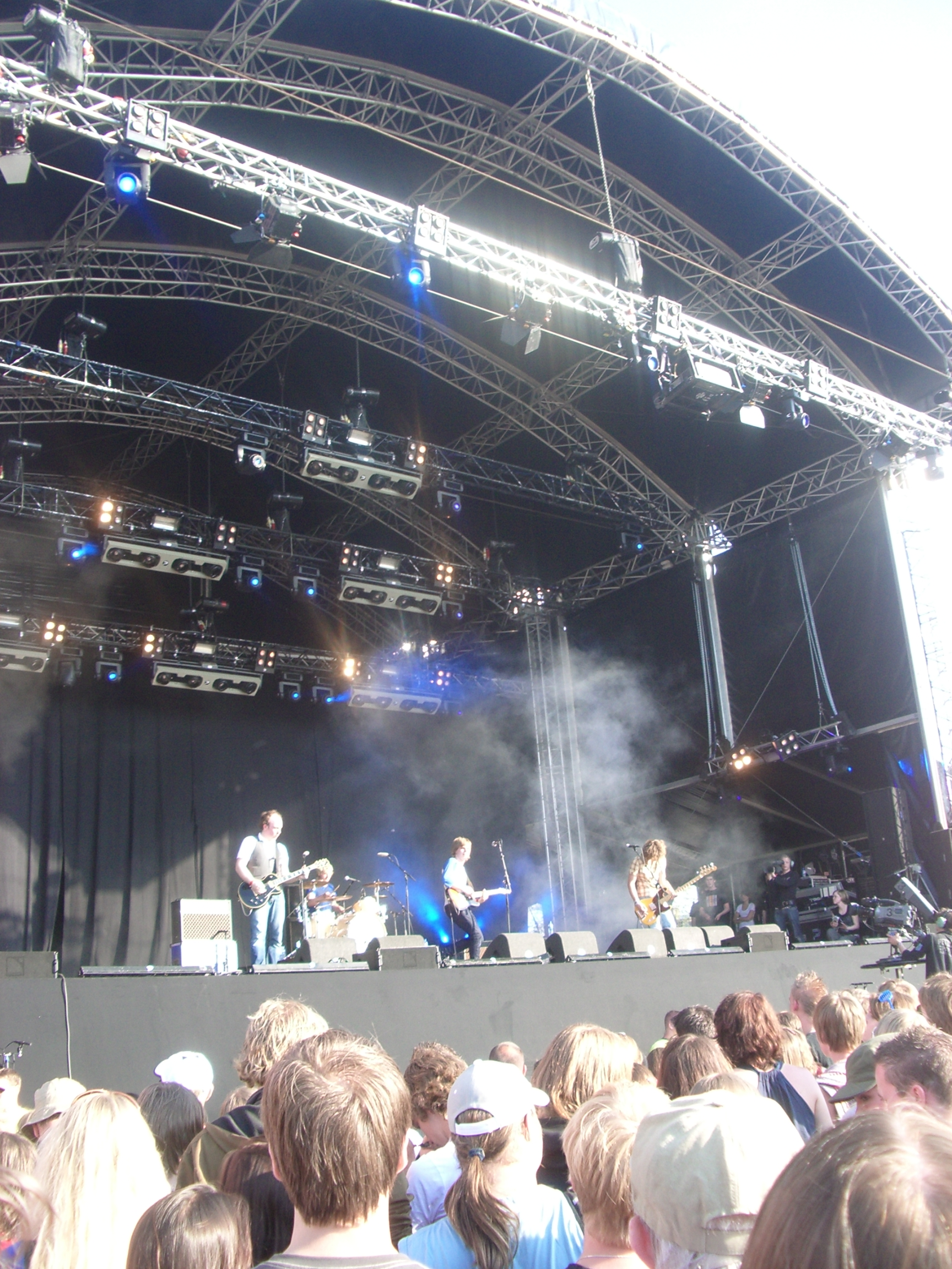 The Girls tijdens bevrijdingsdag Zwolle